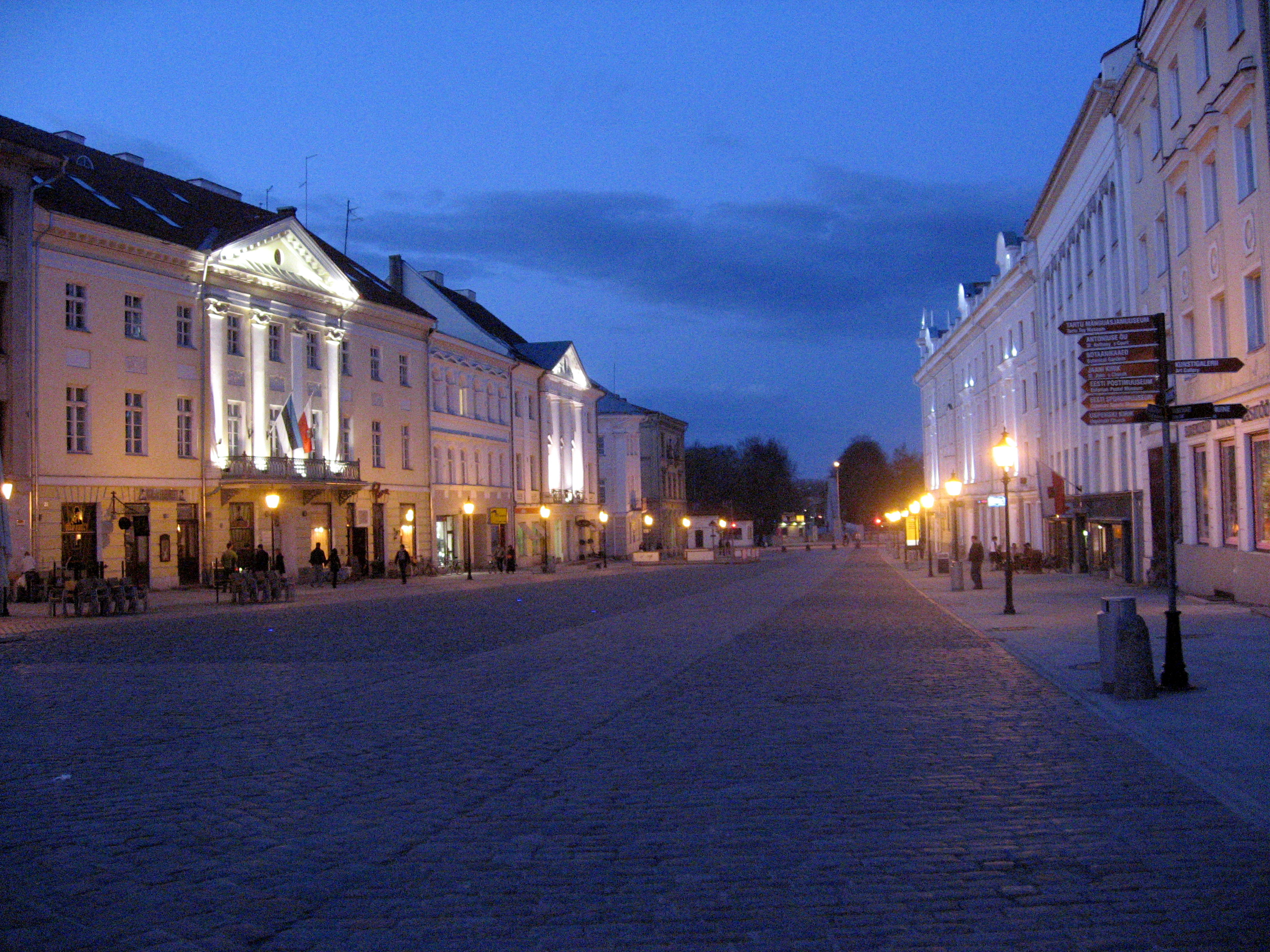 Tartu